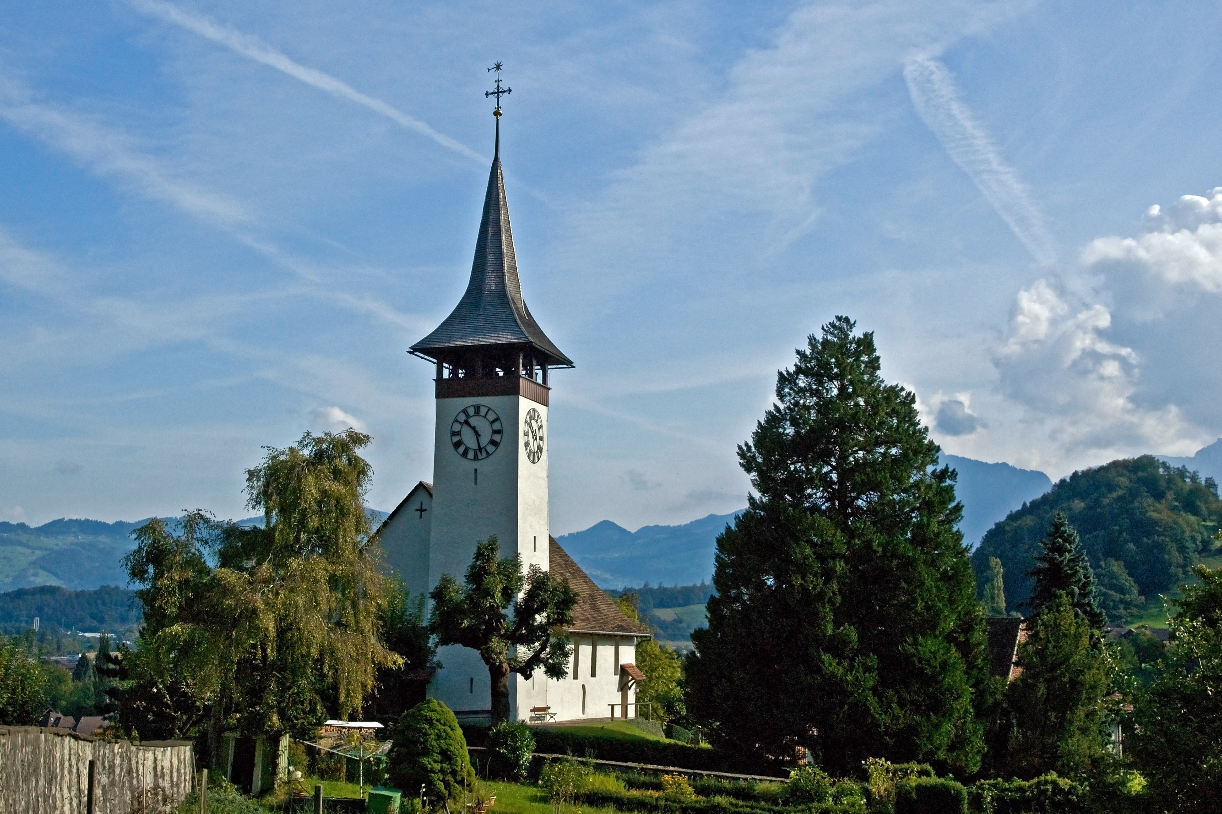 Wimmis, die reformierte Kirche im Morgenlicht